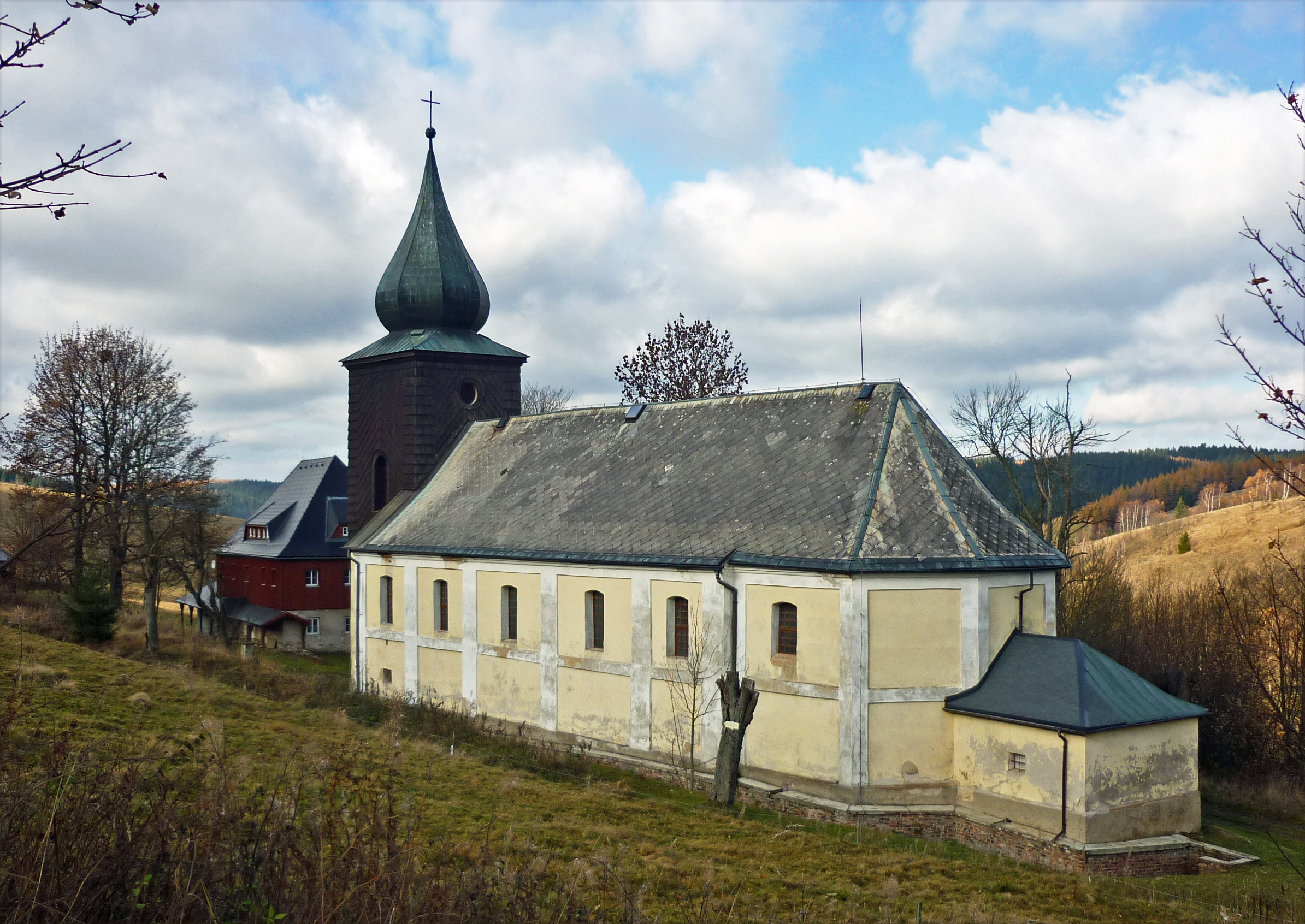 Pfarrkirche Mariä Heimsuchung in Moldau/Moldava im Erzgebirge